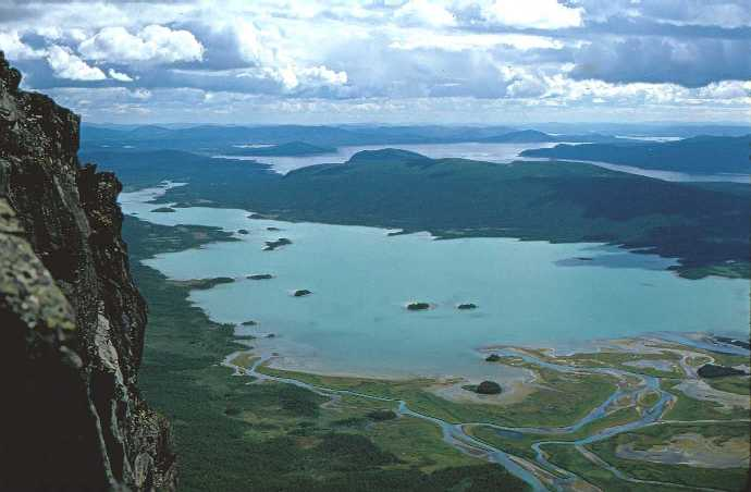 Laidaure vid Aktse